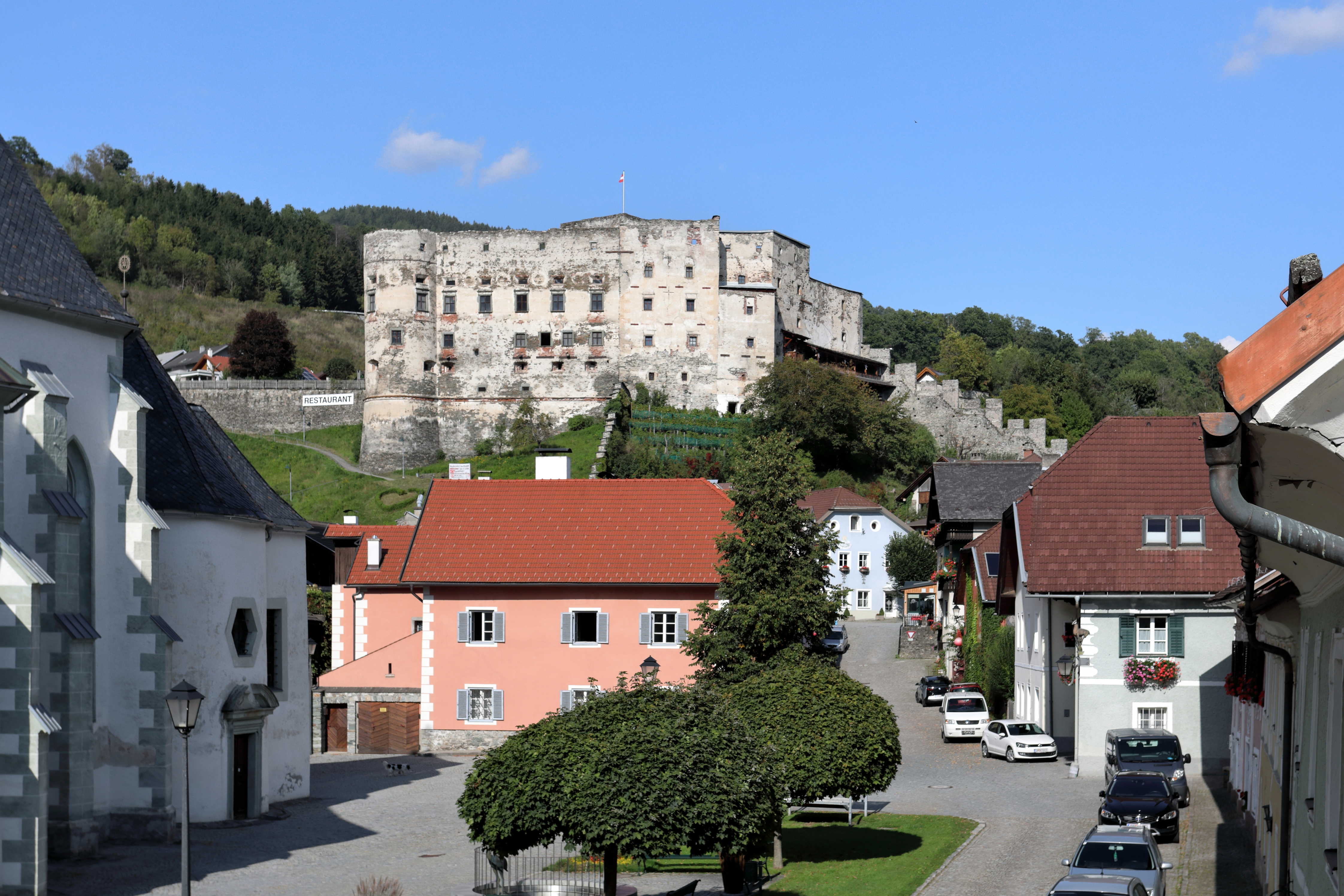 Südwestansicht der „Alten Burg“ in der österreichischen Stadtgemeinde Gmünd in Kärnten.Nach einem Brand im Jahr 1886 wurde die 1252 erstmals urkundlich erwähnte Burg dem Verfall preisgegeben. Seit 1950 ist sie im Besitz der Stadtgemeinde.